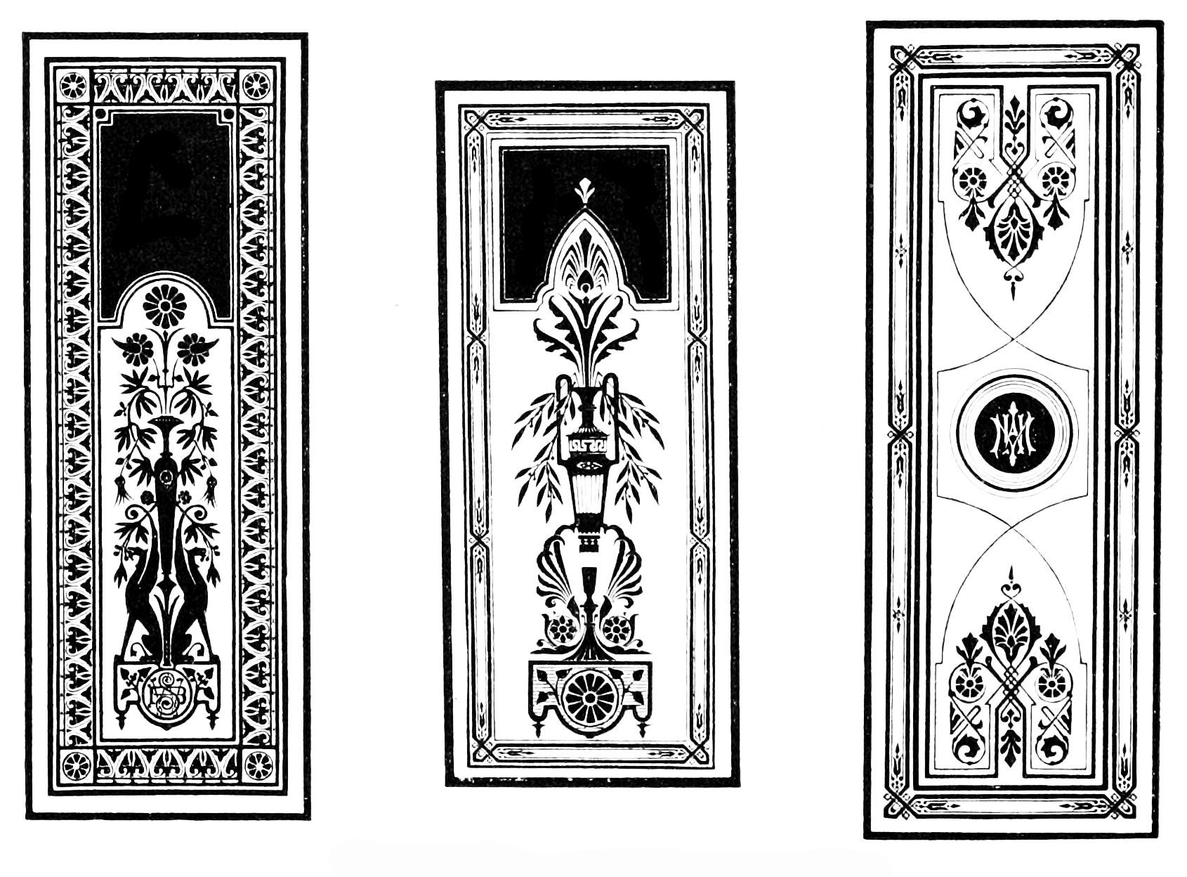 Plates engraved by sandblast